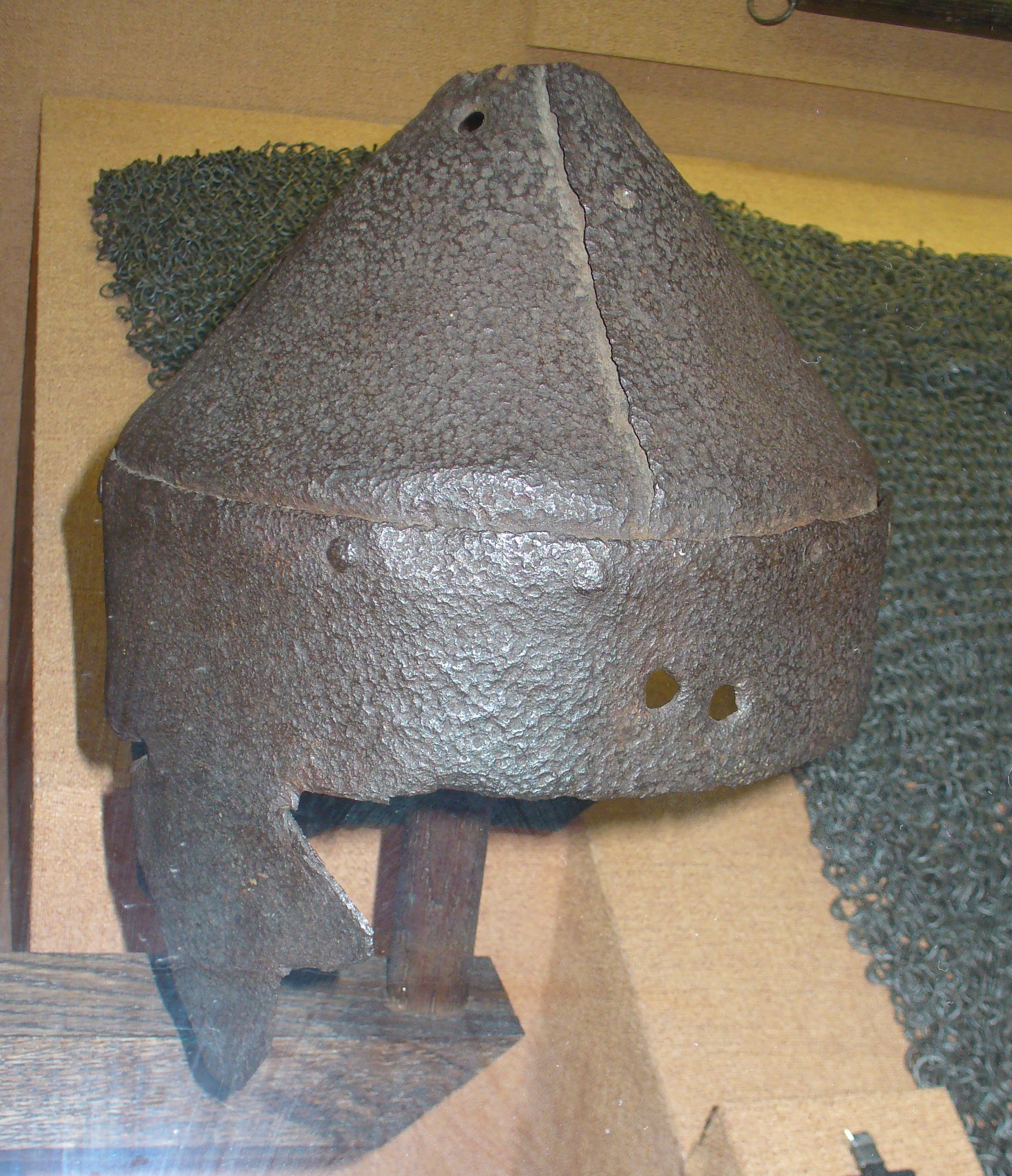 Шлем Белая Калитва, XIV век.